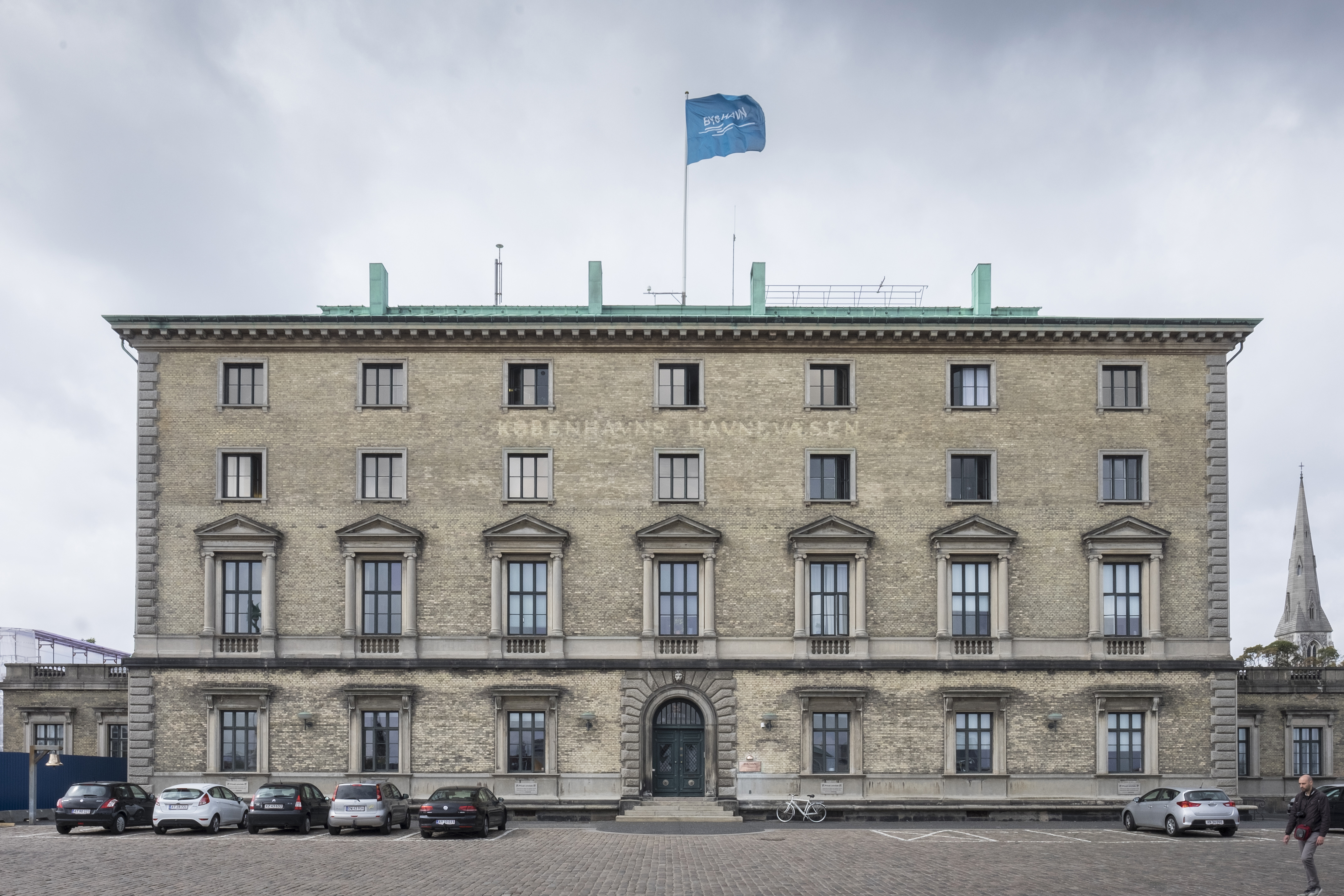 Udviklingsselskabet By & Havn I/S kontor i Köpenhamn. Företaget, som ägs till 95 procent av Köpenhamns kommun och 5 procent av danska staten, äger och utvecklar markområdena Ørestad, Københavns Havn och Nordhavnen till nya bostads och kontorsområden samt är hälftenägare i Köpenhamns och Malmös gemensamma hamnbolag Copenhagen Malmö Port, CMP..Photo: News Øresund - Johan Wessman.© News Øresund - Johan Wessman (CC BY 3.0)..Detta verk av News Øresund är licensierat under en Creative Commons Erkännande 3.0 Unported-licens (CC BY 3.0). Bilden får fritt publiceras under förutsättning att källa anges. .The picture can be used freely under the prerequisite that the source is given. News Øresund, Malmö, Sweden.. Øresund är en oberoende regional nyhetsbyrå som är en del av det oberoende dansk-svenska kunskapscentrat Øresundsinstituttet..